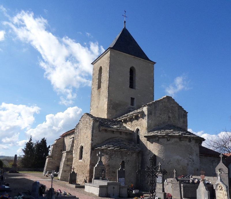 Église Saint-Julien (Inscrit) .